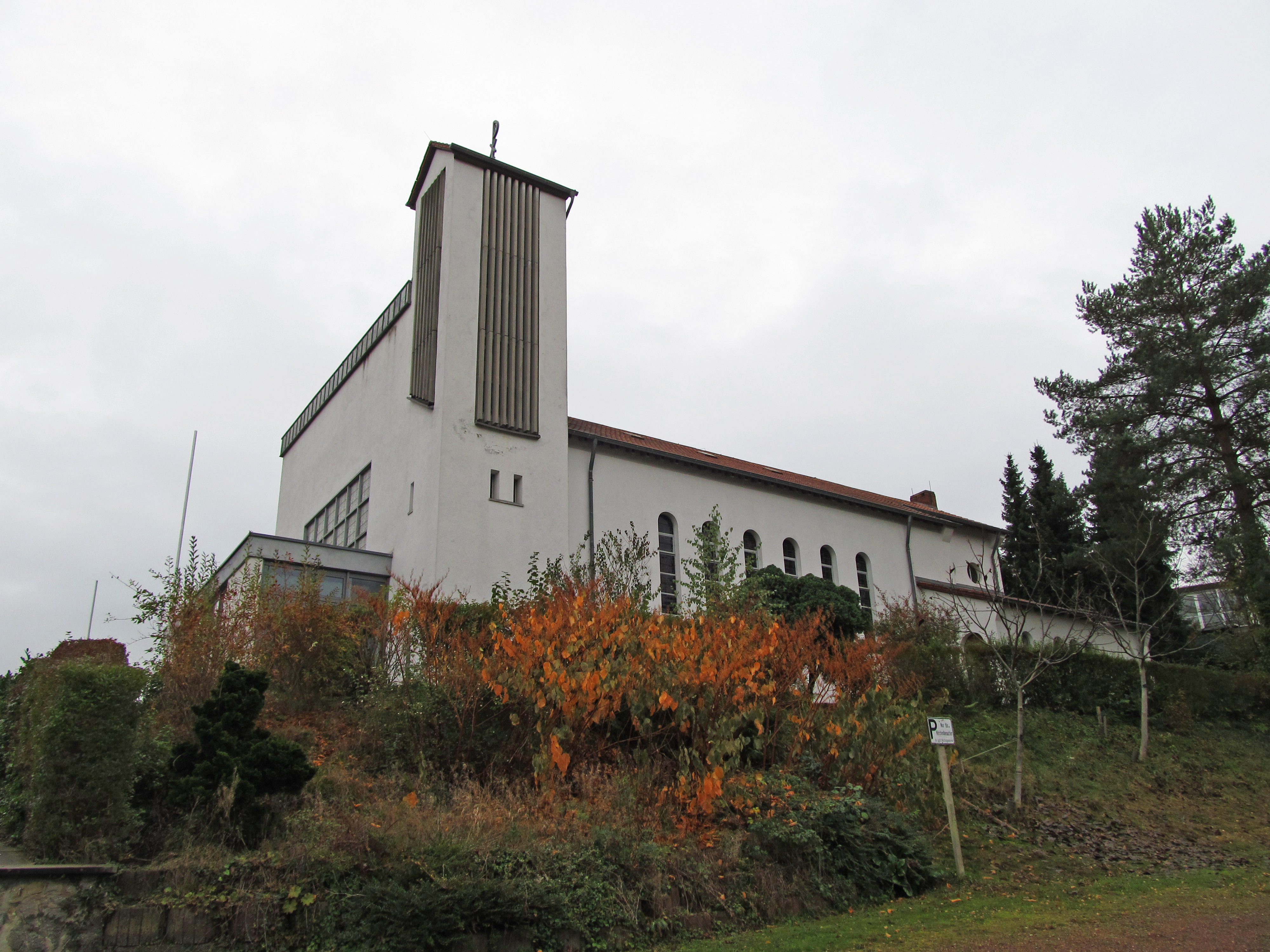 Die katholische Kirche St. Ursula in Scheidt, einem Stadtteil der saarländischen Landeshauptstadt Saarbrücken